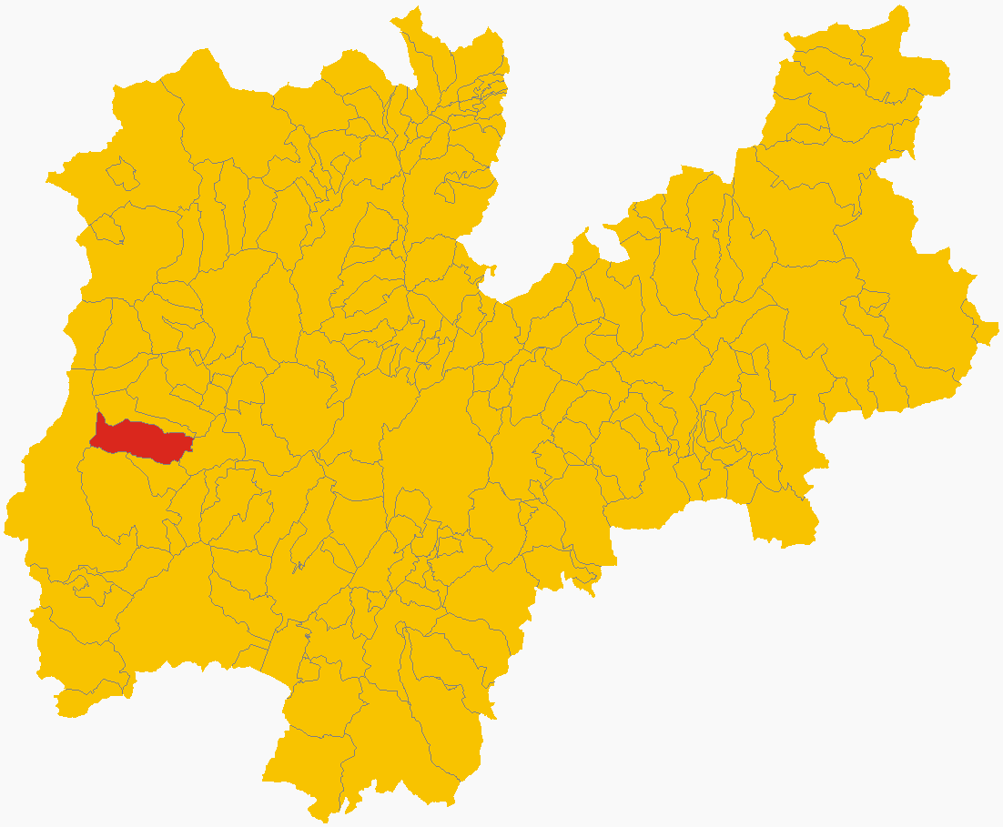 Mappa del comune di Porte di Rendena nella provincia di Trento, in Italia.